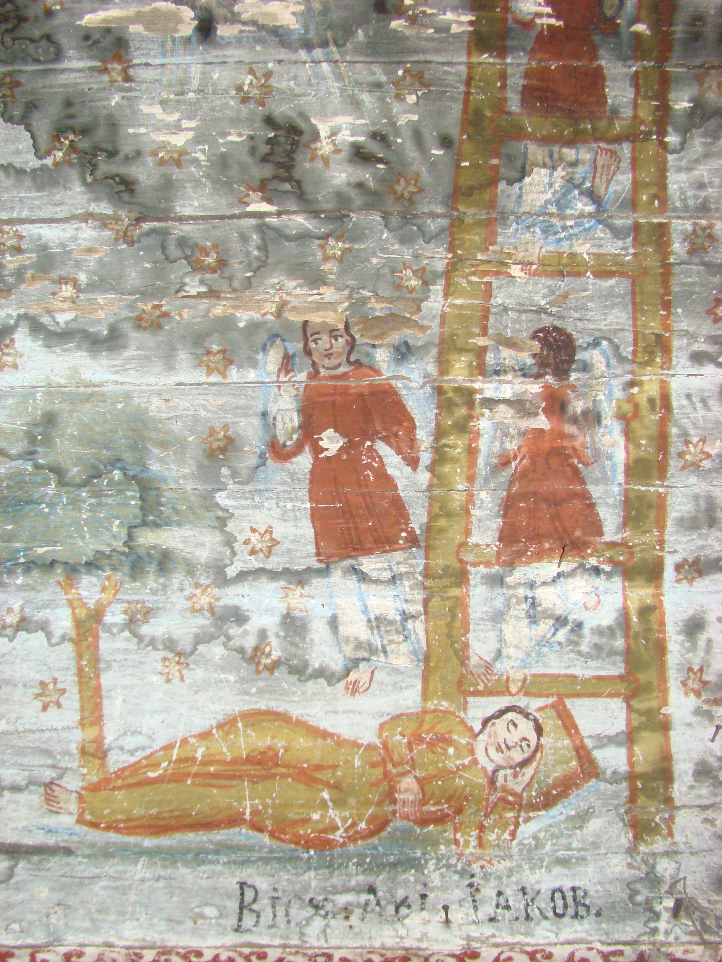 Biserica de lemn "Cuvioasa Paraschiva" , sat STEJERA; comuna MIREŞU MARE